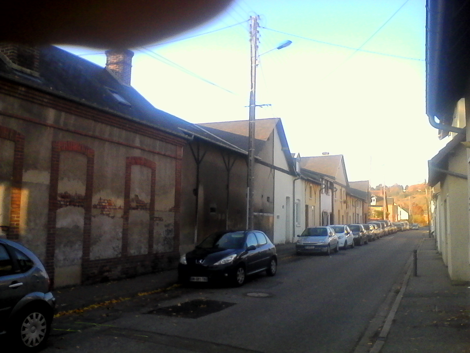 Ancienne Usine Textile de Navarre fondé sur monarchie de juillet en 1839 et fermé en 2003